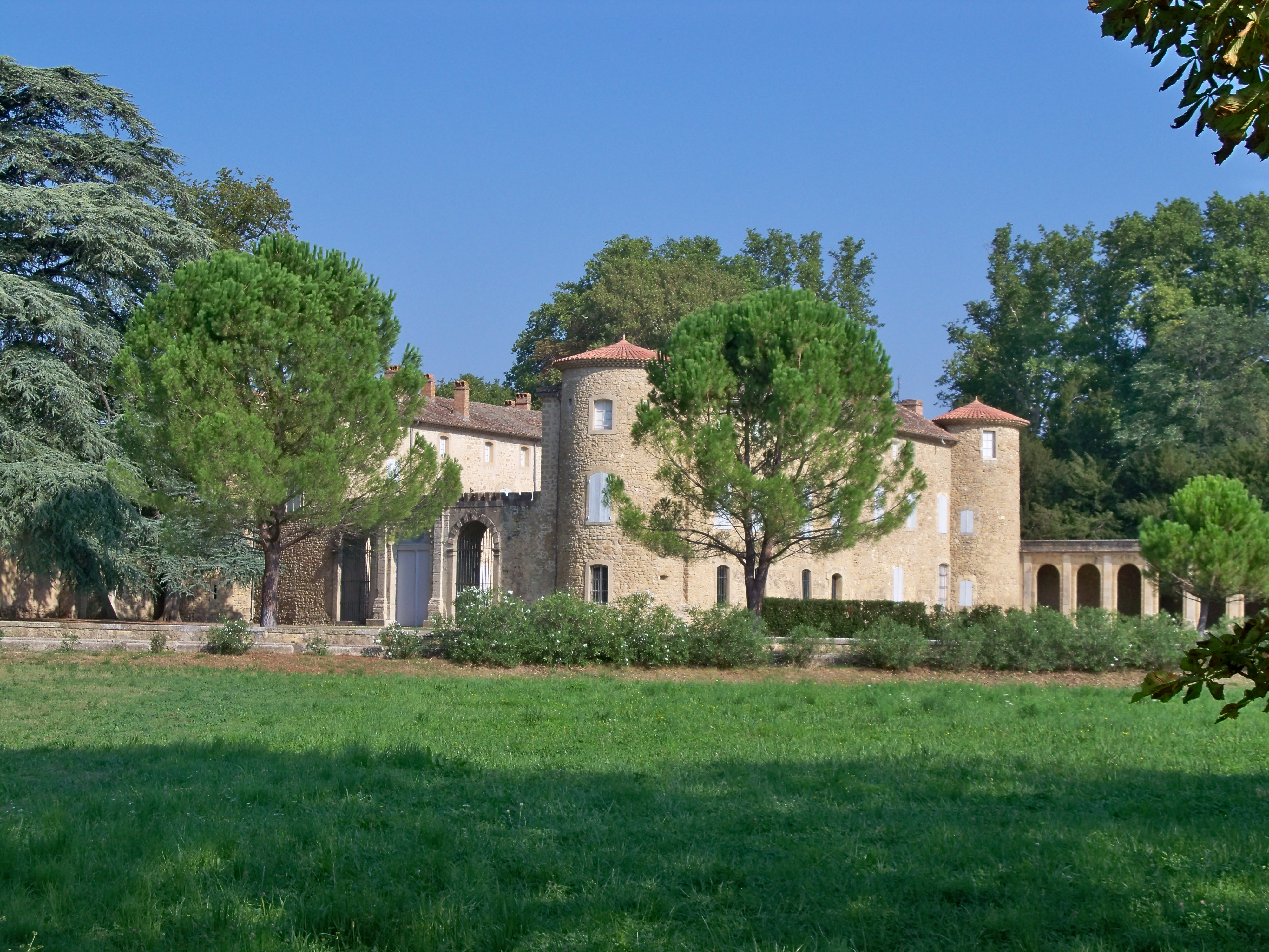 Terre de Causanscommuns, église, presbytère, cour, jardin, parc, clôture, portail, maison, élévation, Route de Violès (Inscrit, 1997) .